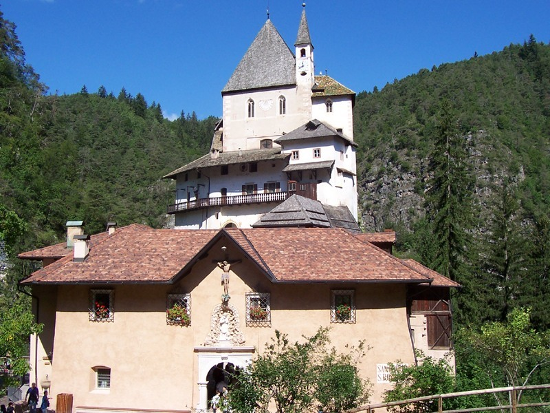 Sanzeno - Santuario di S. Romedio